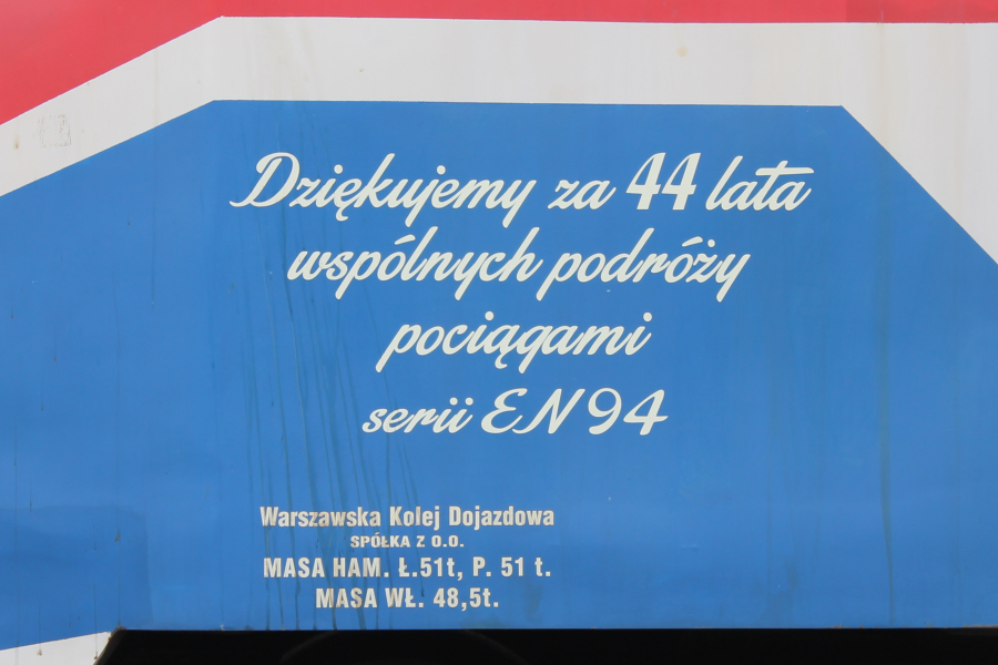 Napis okolicznościowy umieszczony na wagonie a elektrycznego zespołu trakcyjnego EN94-25 z okazji zakończenia eksploatacji jednostek serii EN94.